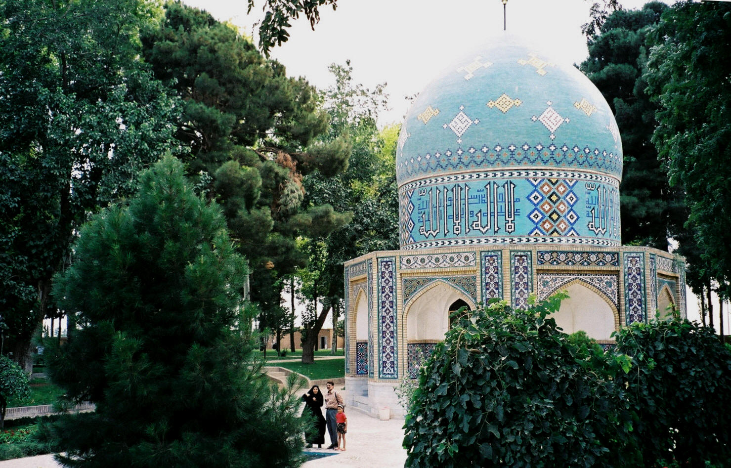 Mausolée de Farid al-Din Attar (1142-1220) à Nichapour (Iran)